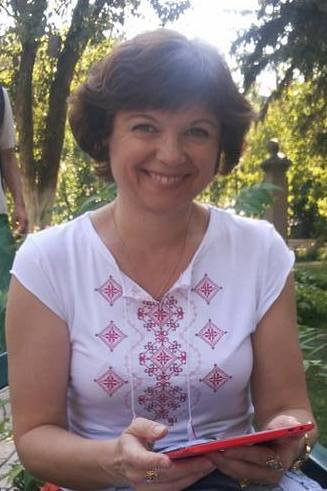 Лілія Батюк-Нечипоренко.